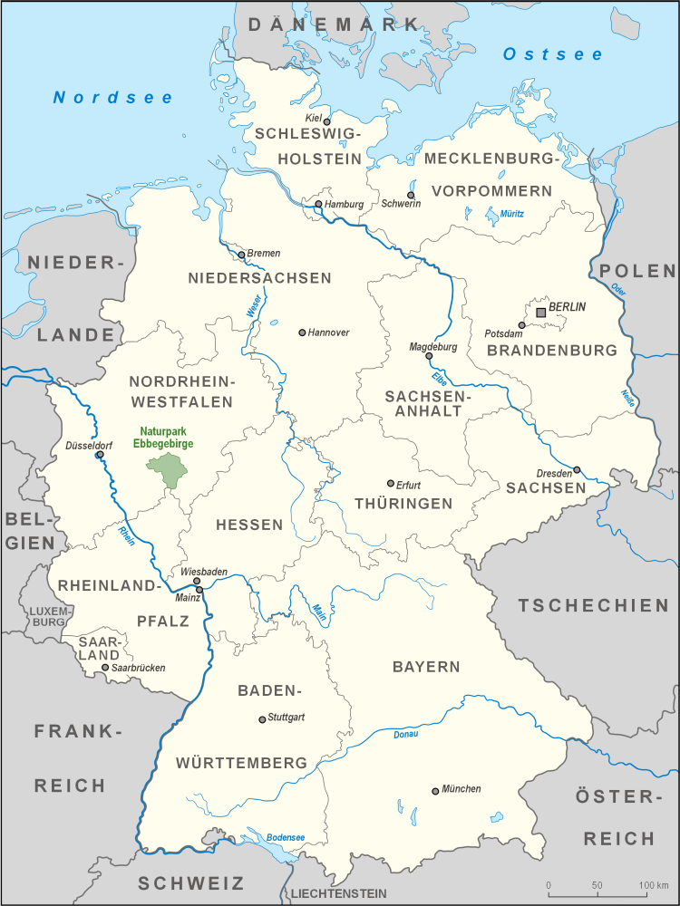 Karte des Naturparks Ebbegebirge in Deutschland